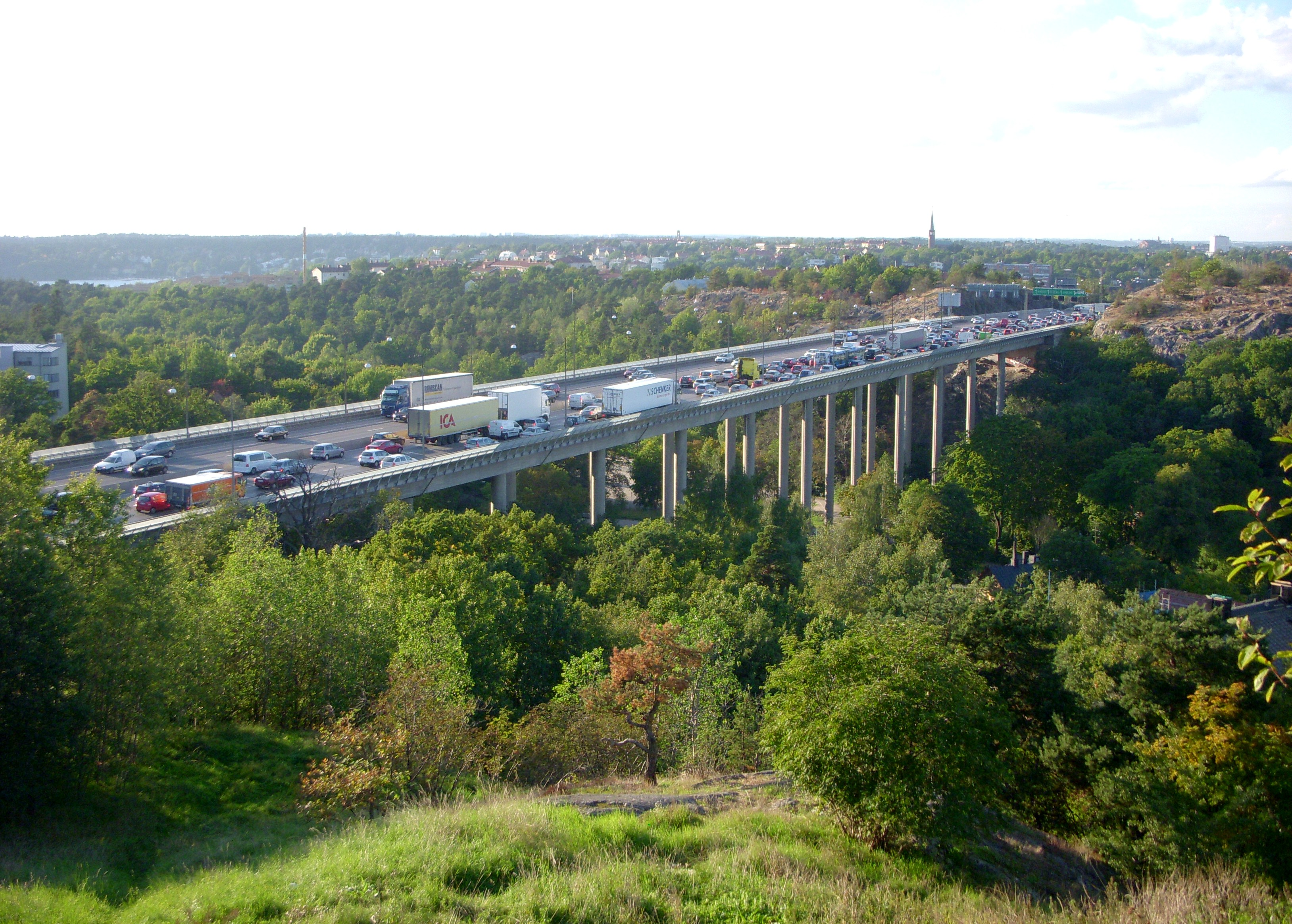 Blommensbergsviadukten i Gröndal